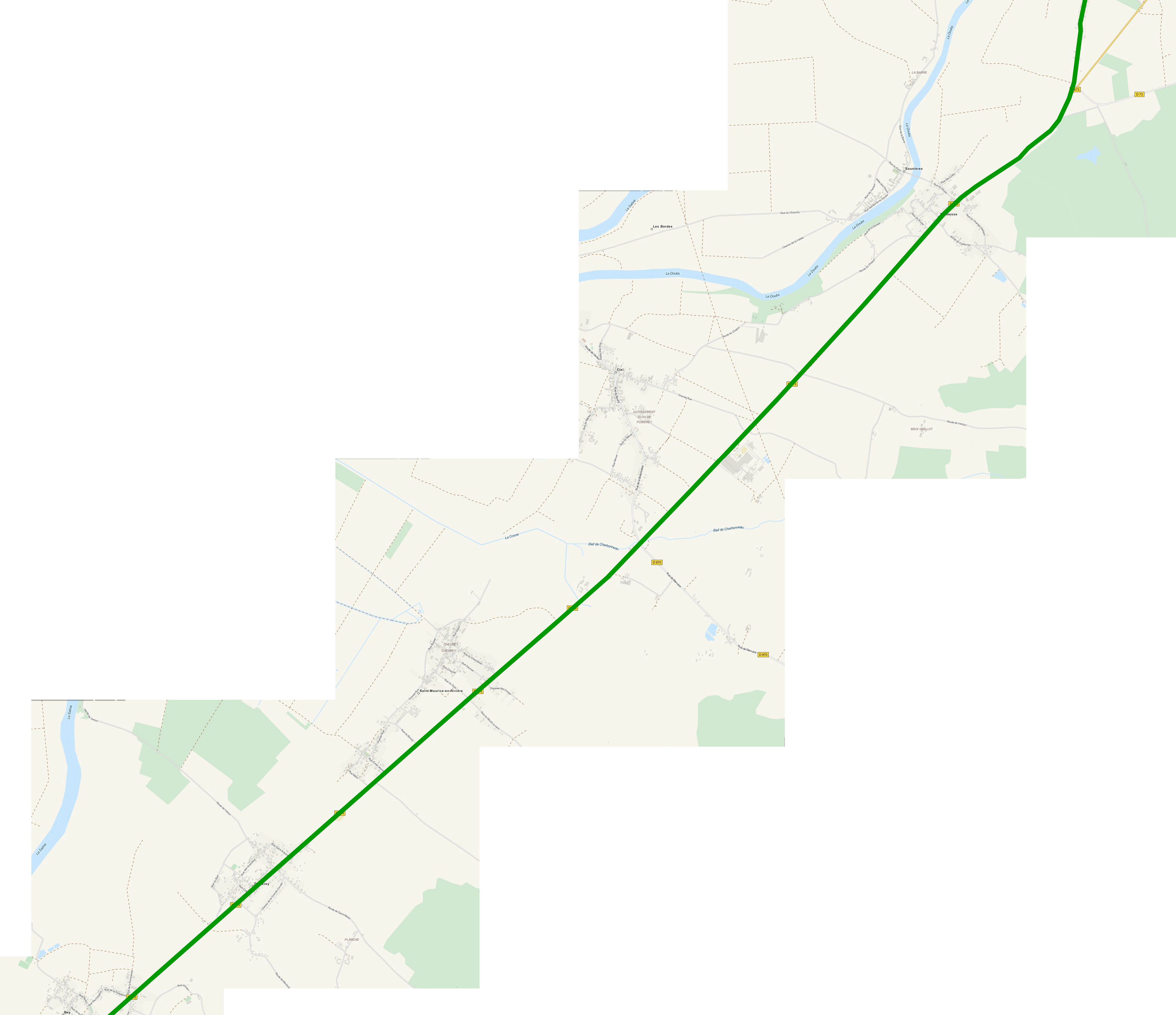 Detailkarte der Römerstrasse von Chalon-sur-Saône nach Besançon - Teilstück Bey bis Sermesse Carte de détail de la voie romaine de Chalon-sur-Saône à Besançon - Partie de Bey à Sermesse This map may be incomplete, and may contain errors. Don't rely solely on it for navigation.